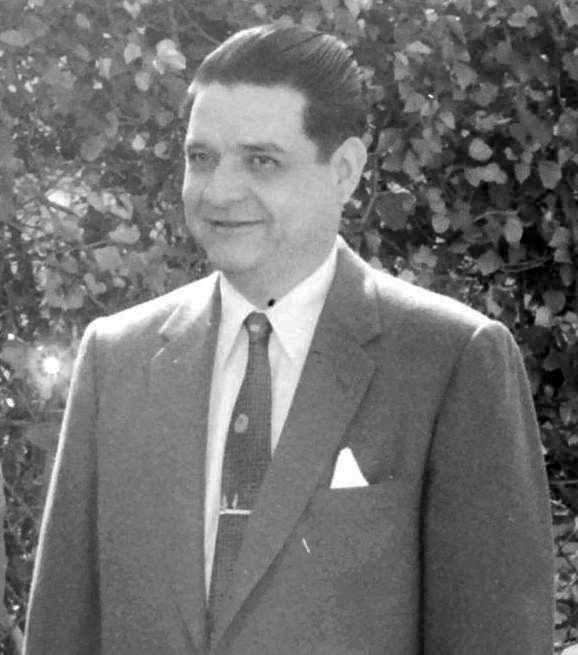 Fotografía antigua de la Ciudad de México resguardadas por el Museo Archivo de la Fotografía (MAF) de la Ciudad de México.